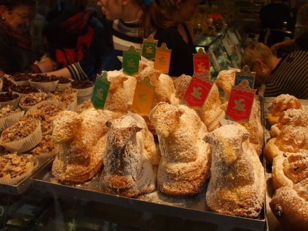 En Alsace, le traditionnel « Osterlammele » en biscuit.